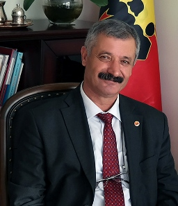 Genel Başkan Fehmi DEMİR HAK-PAR